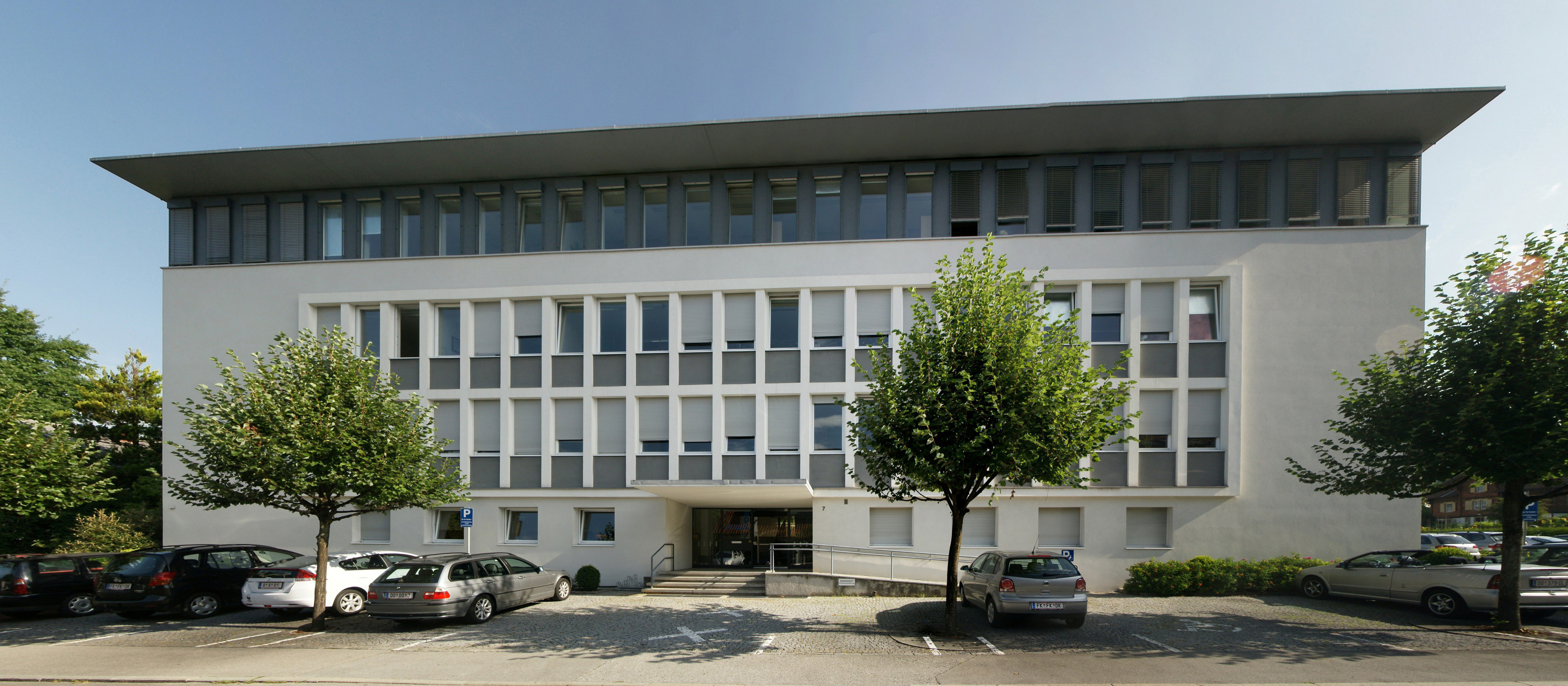 Die Vorarlberger gemeinnützige Wohnungsbau- und Siedlungsgesellschaft m.b.H. (VOGEWOSI) ist der größte gemeinnützige Bauträger des öffentlichen Wohnungsbaus im österreichischen Bundesland Vorarlberg. Im Bild, das Verwaltungsgebäude in der Sankt-Martin-Straße 7 in Dornbirn. Aufstockung des Verwaltungsgebäude 1988, Architektur „Wolfgang Ritsch“